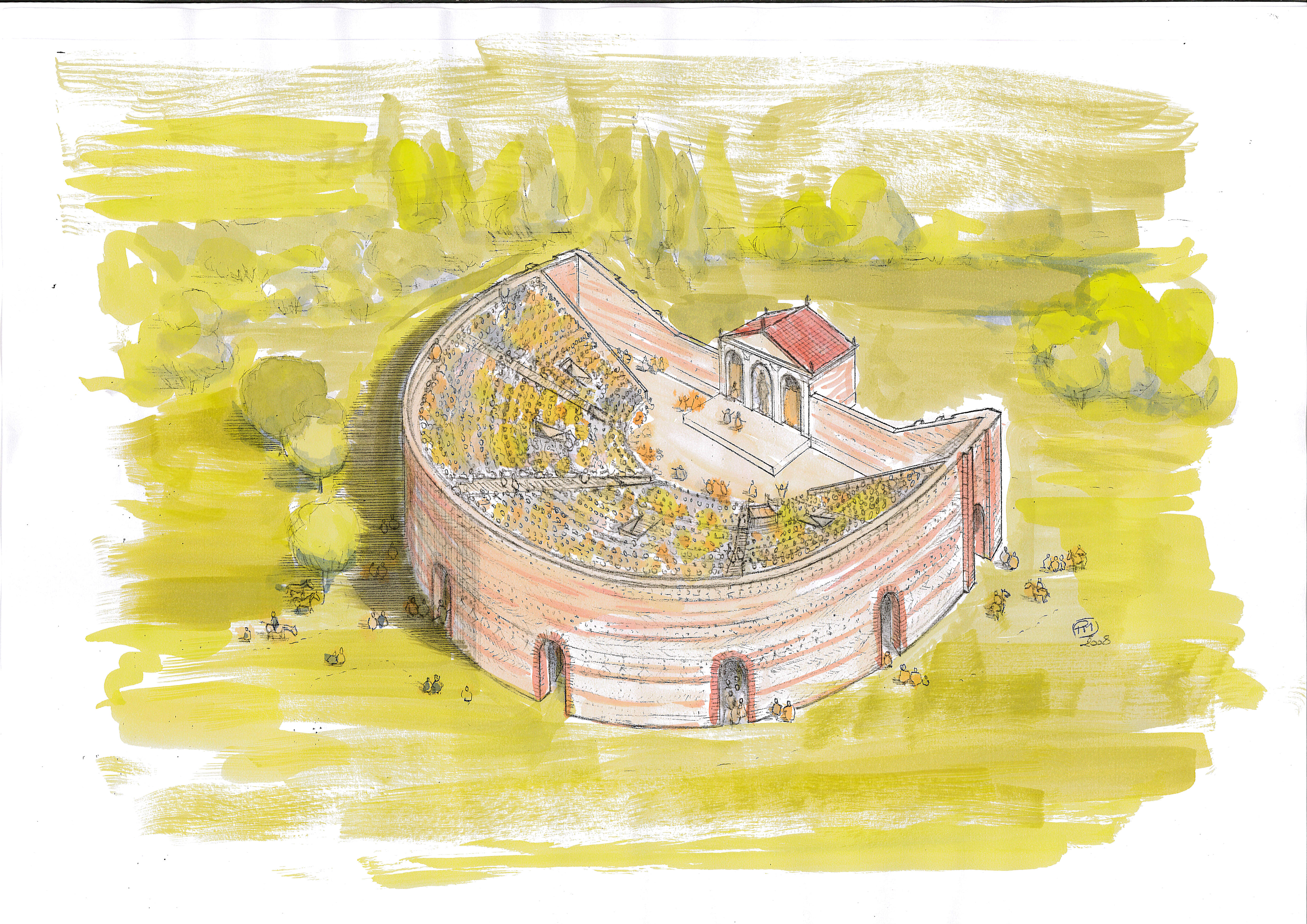 Proposition de restitution du théâtre de de Cherré. Dessin original de Pascal Mariette.